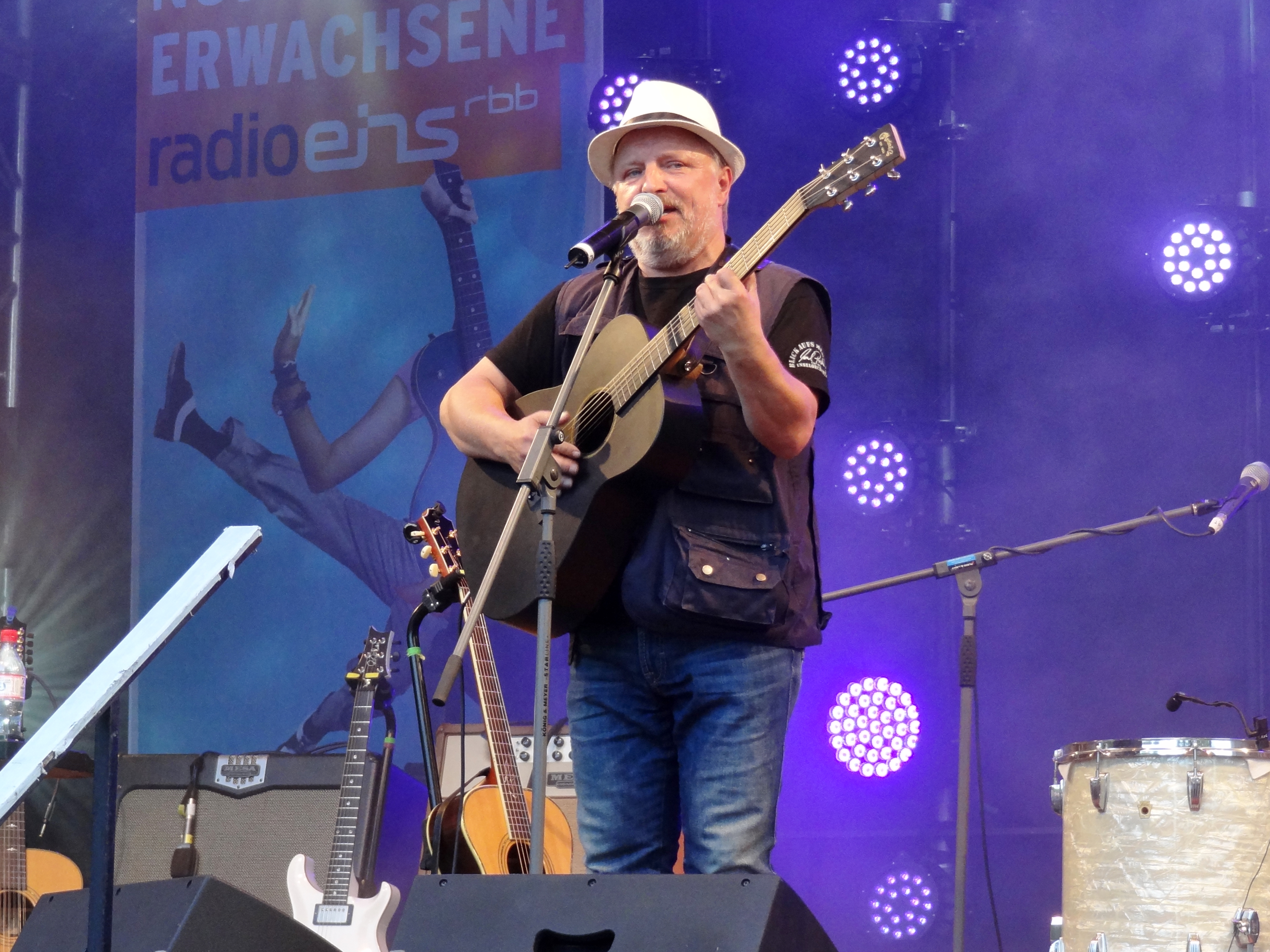 Axel Prahl beim 13. Inselleuchten-Festival in Marienwerder, Land Brandenburg, Deutschland